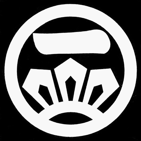 丸に竜剣に一の字